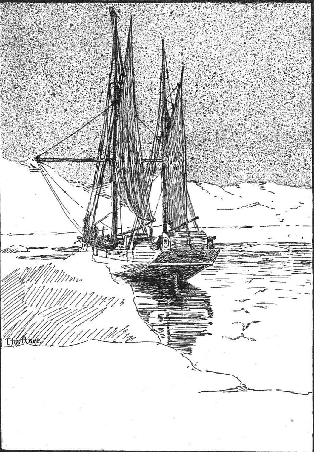 Das Schiff Herzog Ernst, mit dem 1912 eine Nordpolarmeer-Expedition unter der Führung von Herbert Schröder-Stranz und Kapitän Alfred Ritscher unternommen wurde.